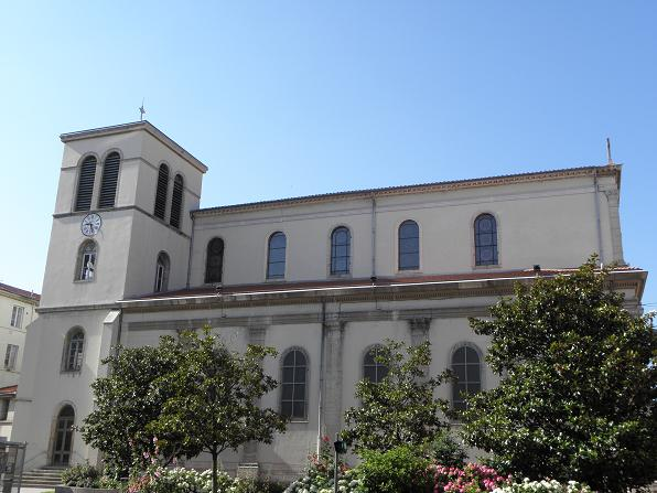 Église N.D. St-Louis de la Guillotière (Lyon 7ème)